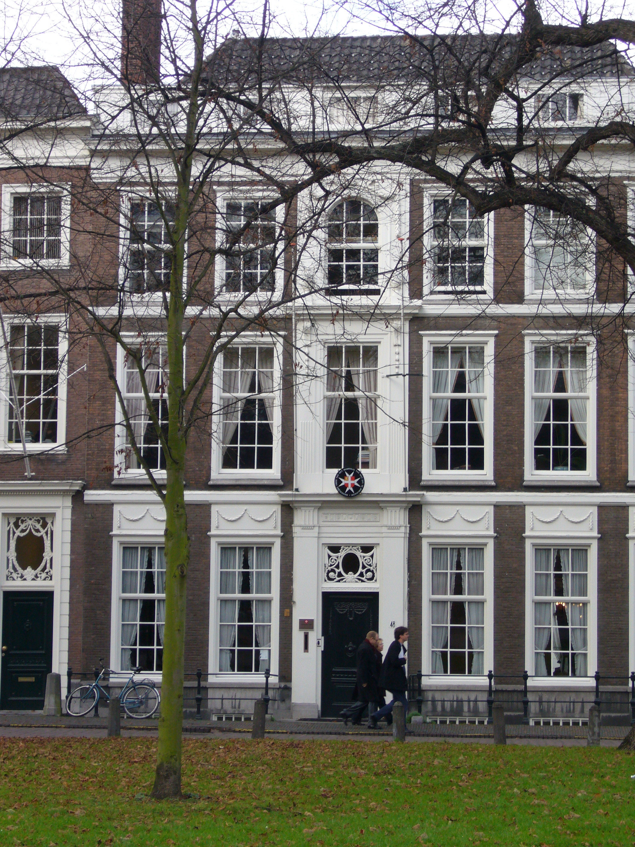 Den Haag, kantoor van de Johanniter Orde aan het Lange Voorhout